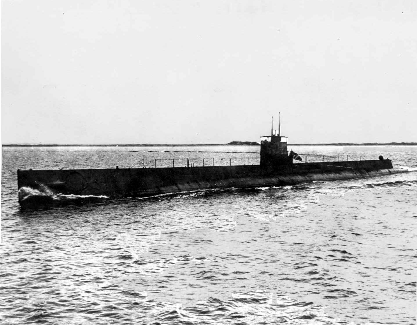 USS AA-1 (SS-52)